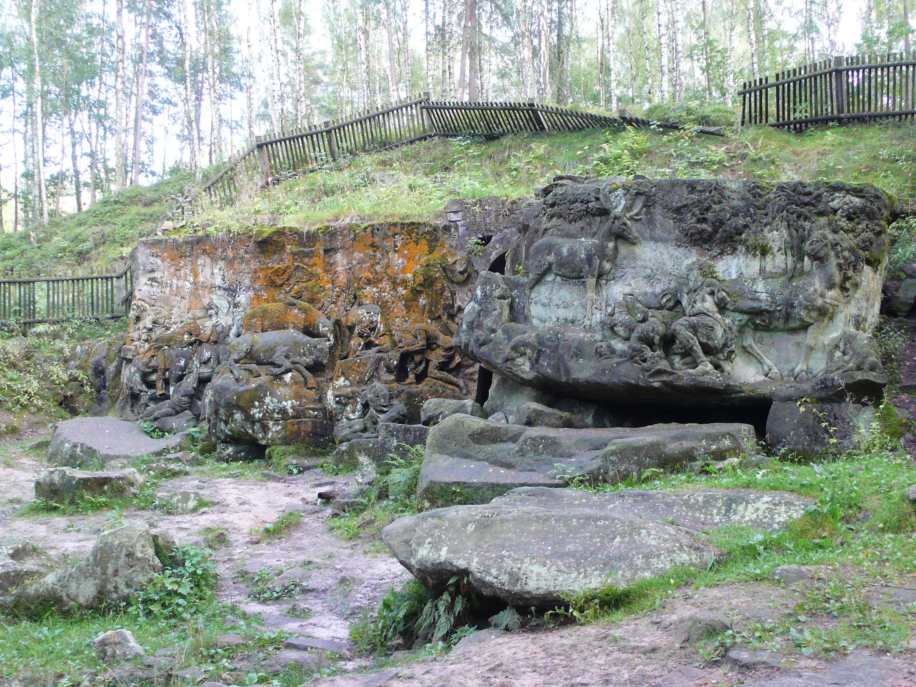 Betlém M. B. Brauna v Kuksu